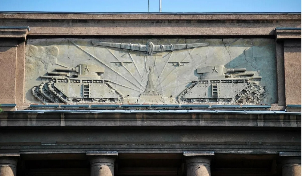 Автор барельефа Дукельский Алексей Маркович (1909 - 1938)